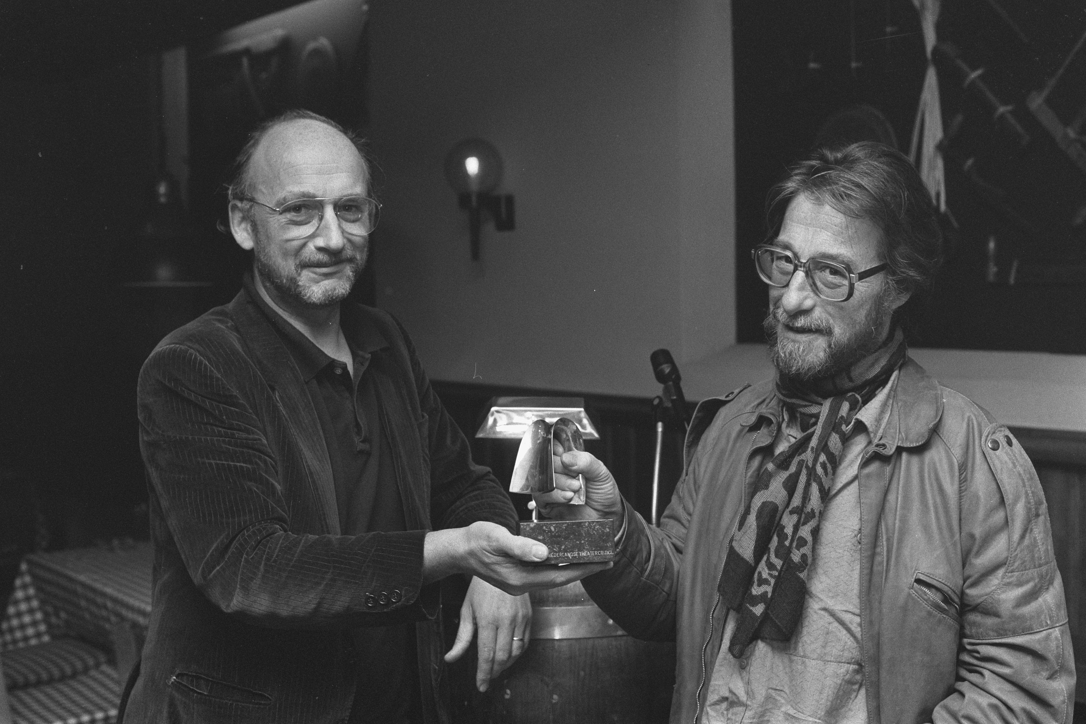 Prijs van de Kring van Nederlandse Theatercritici 1986 toegekend aan toneelgroep Appel voor "Faust"; regisseur Hans Croiset (l) en acteur directeur Erik Vos Datum 17 november 1986